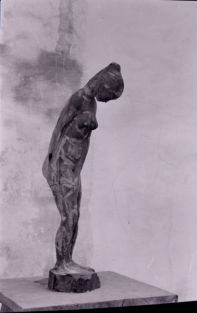 Servizio fotografico : Rimini, 1956 / Paolo Monti. - Buste: 6, Fototipi: 8 : Negativo b/n, gelatina bromuro d'argento/ pellicola ; 6x9. - ((Serie costituita da 6 buste di carta identificate con i nn.: R14990/1, R14991/2, R14992/3, R14994/4, R14995/5, R15001, R15002, R15003, R15004. - Sulla busta R14990: "Morri". - Le buste sono tenute insieme da una graffetta ad altre 9 buste di negativi di formato minoree, che vengono catalogati come altra serie. La serie completa quindi comprende i negativi R14990-15004. - Quaderno di Paolo Monti: s.t. [Soggetti e committenti] (1956-1961), presso Archivio Paolo Monti. - Fonte